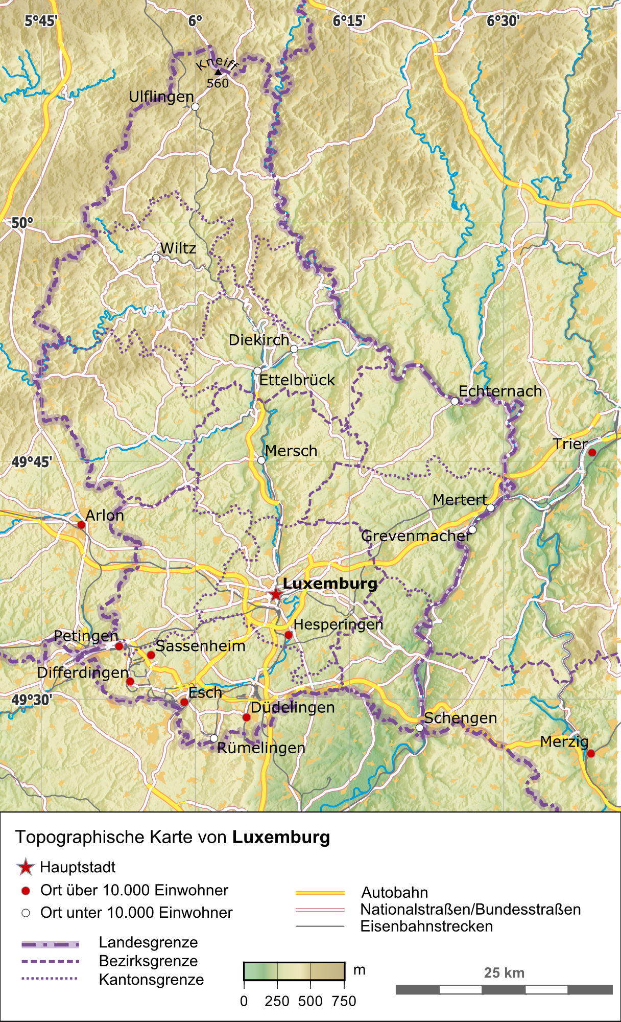 Topographische Karte von Luxemburg